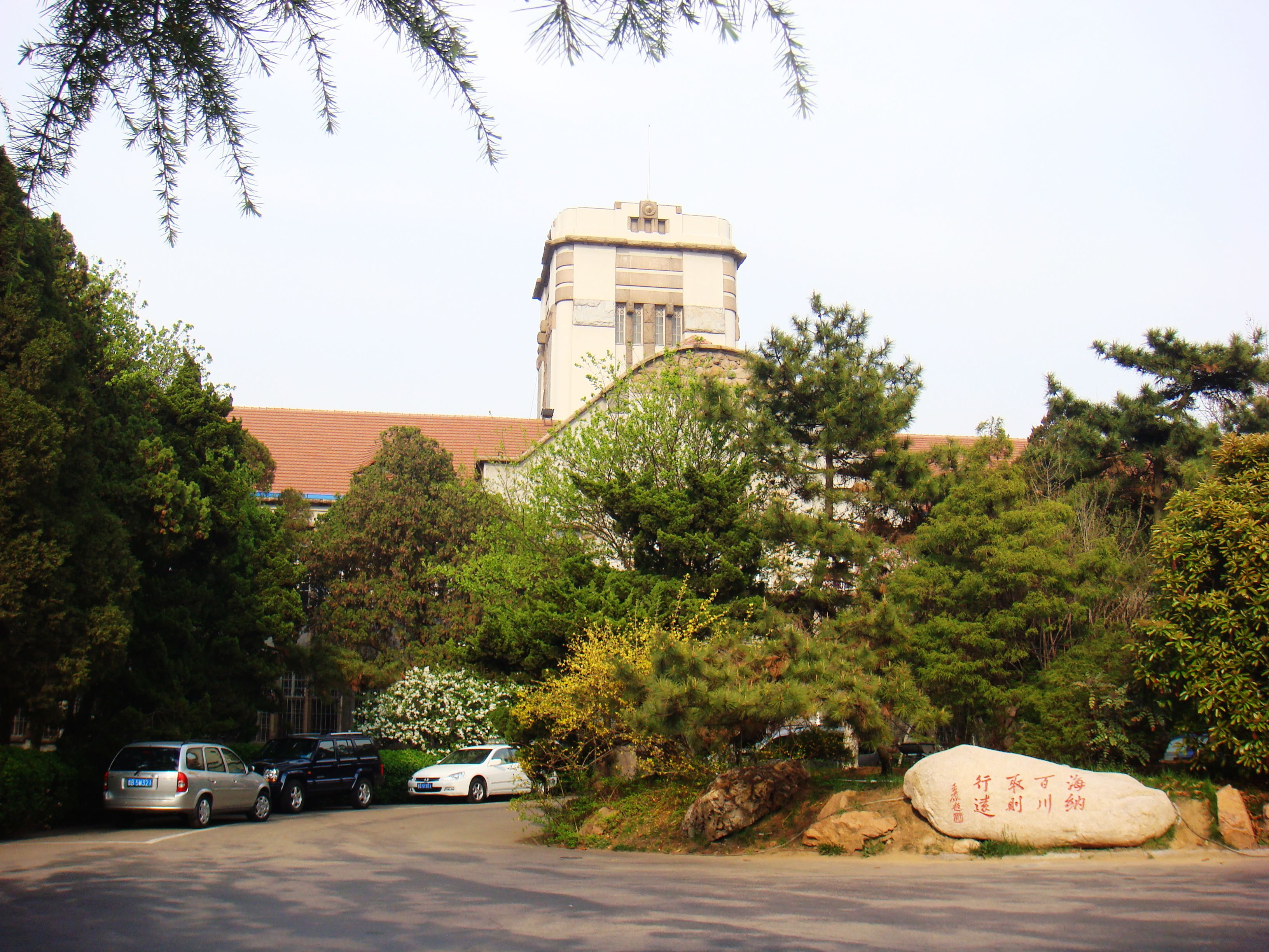 中国海洋大学鱼山校区主楼，原日本女子中学旧址。